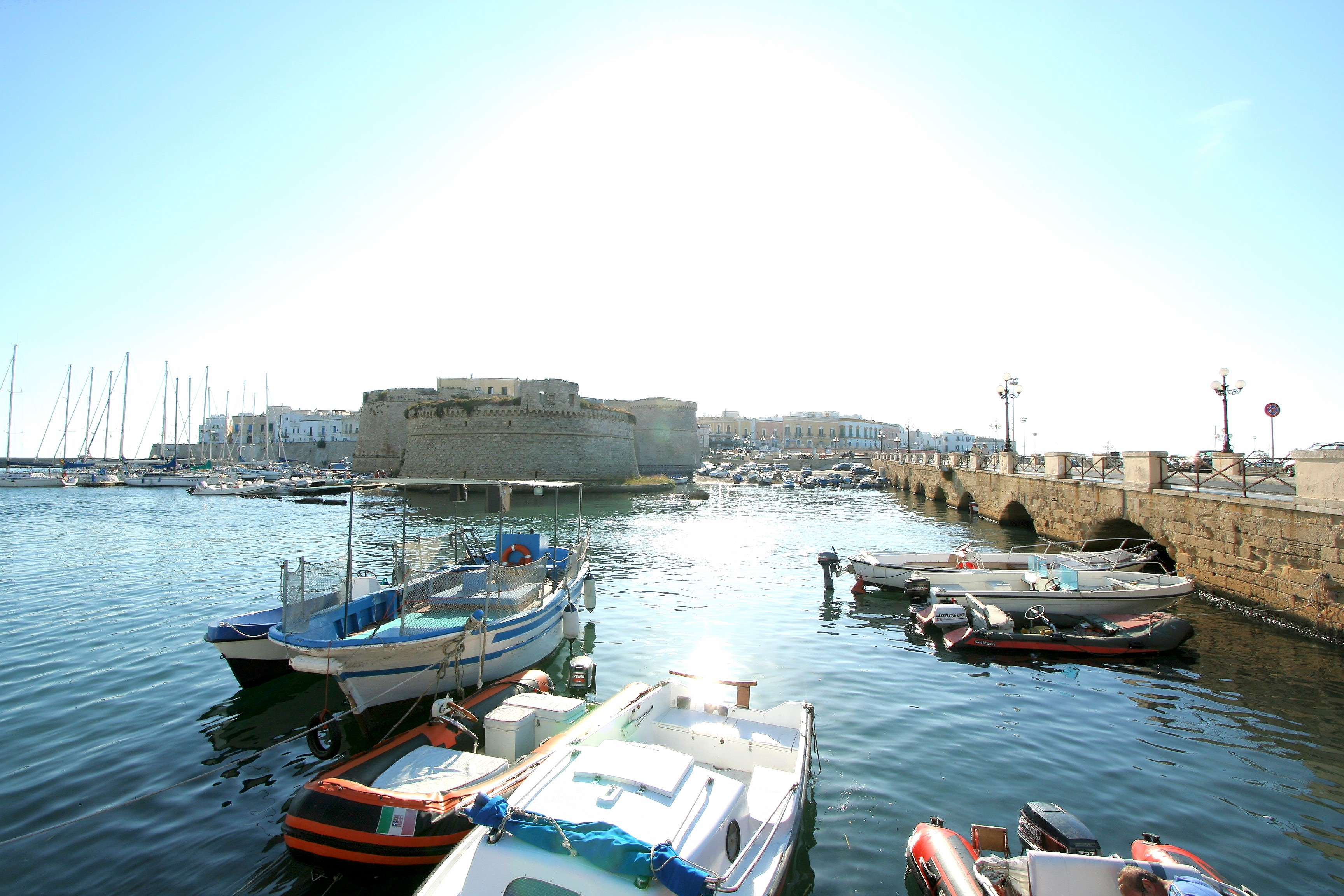 Brücke zur Altstadt und Festung.